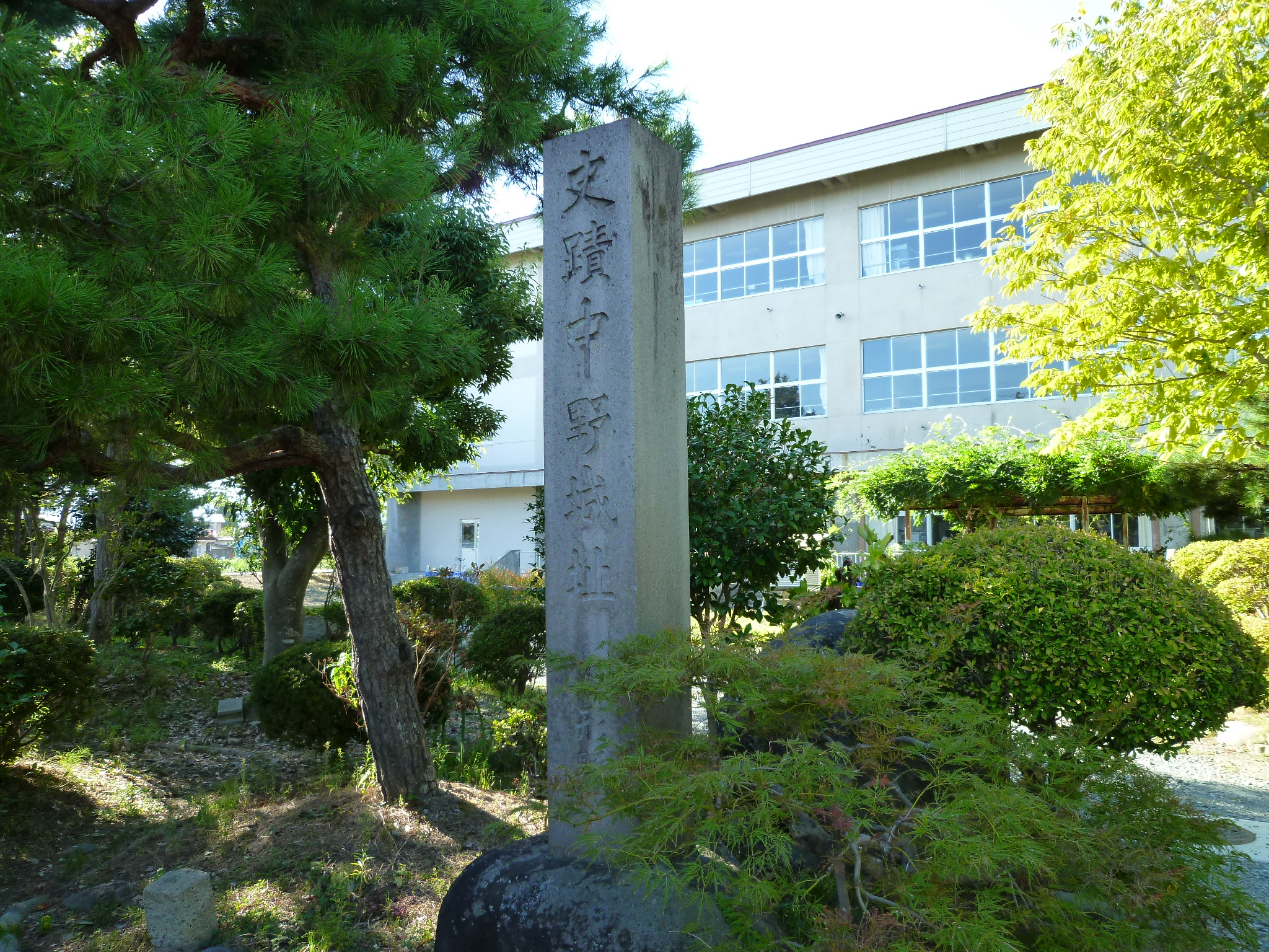 中野城跡（山形県山形市）。現・大郷（おおさと）小学校